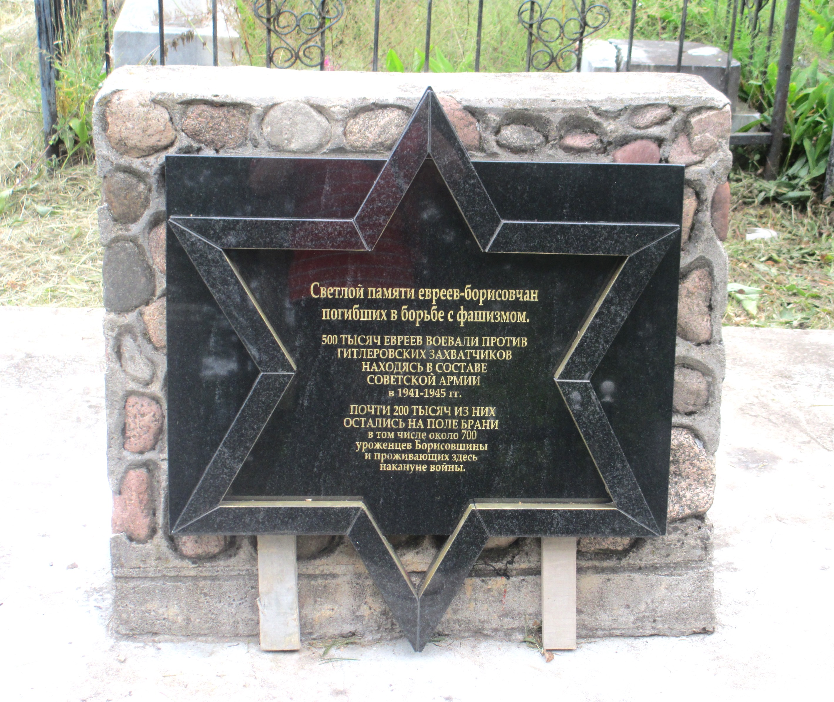 Символический памятник евреям - уроженцам города Борисова, погибшим на фронтах Второй мировой войны. Установлен в 2018 году на еврейском кладбище Борисова.